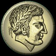 Représentation du roi guerrier Jugurtha.